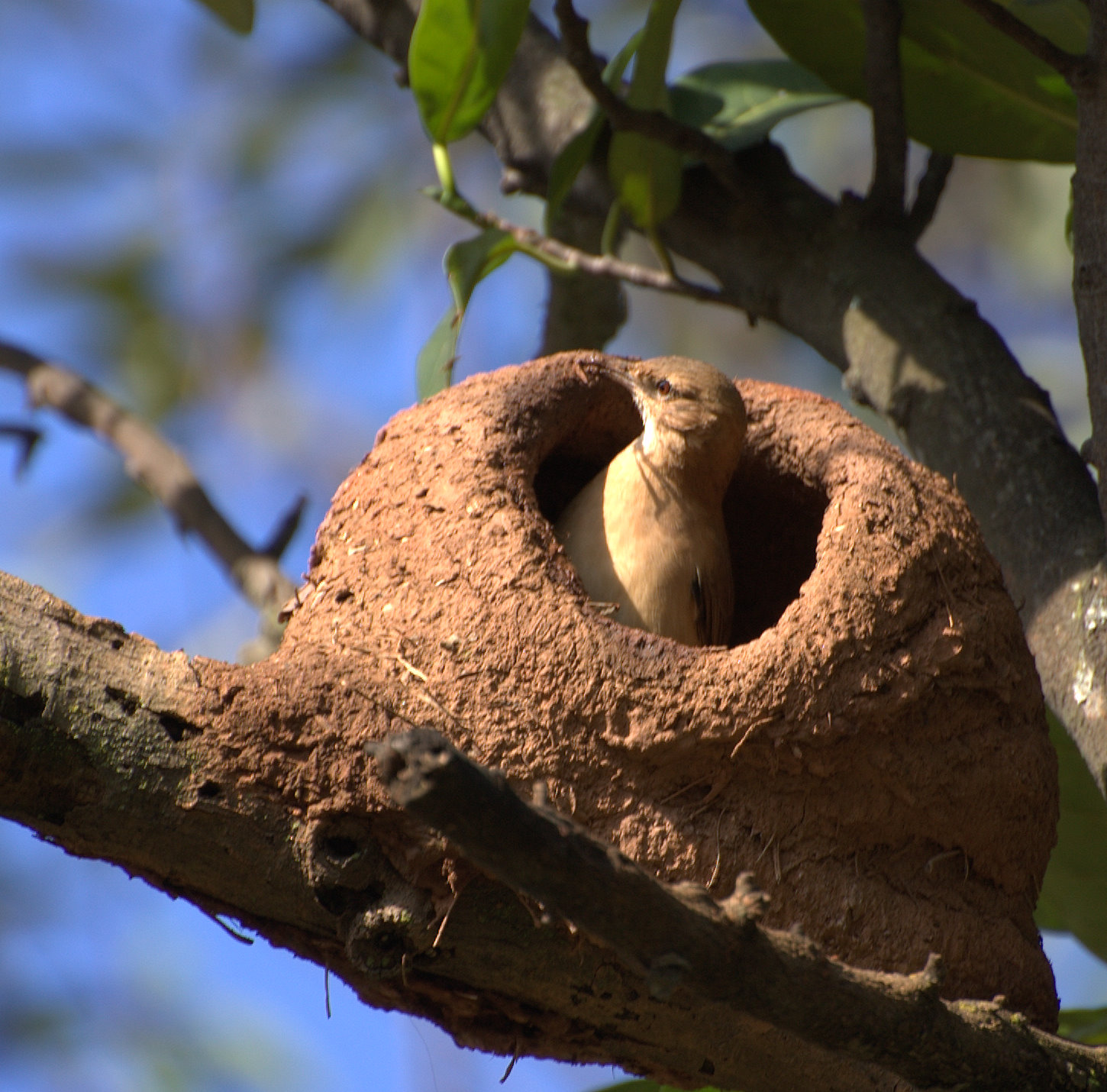 Rufous Hornero, Furnarius rufus building nest. SÉRIE JOÃO-DE-BARRO Parque da Independência, Museu do Ipiranga, São Paulo